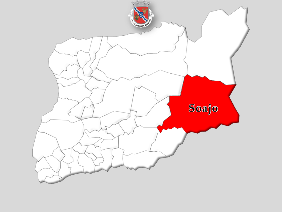 Censos 1864/2011